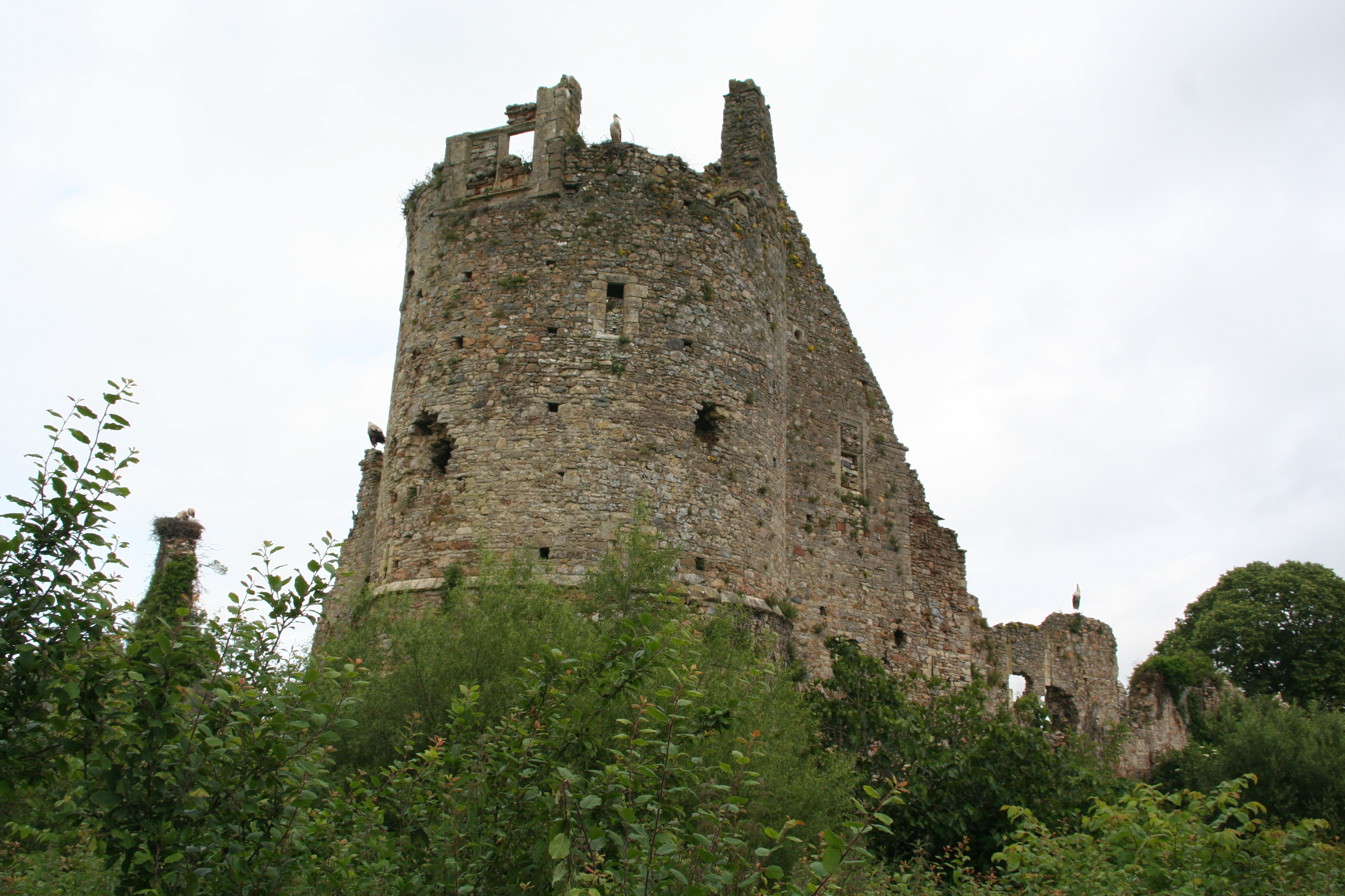 chateau de la rivière à st fromond (Manche)